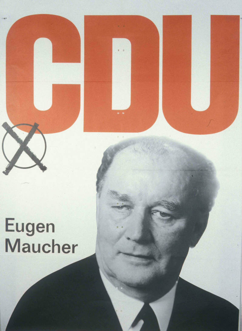 CDU Eugen Maucher Abbildung: Porträtfoto - Stimmkreuz Plakatart: Kandidaten-/Personenplakat mit Porträt Auftraggeber: CDU Bonn Drucker_Druckart_Druckort: KVD Köln Objekt-Signatur: 10-001: 1383 Bestand: Plakate zu Bundestagswahlen (10-001) GliederungBestand10-18: Plakate zu Bundestagswahlen (10-001) » Die 6. Bundestagswahl am 28. September 1969 » CDU » Mit Porträtfoto Lizenz: KAS/ACDP 10-001: 1383 CC-BY-SA 3.0 DE